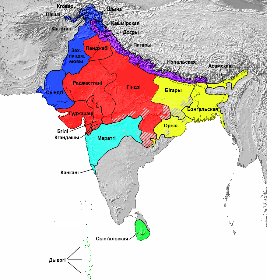 Беларуская (тарашкевіца): Арэал індаарыйскіх моваў, пераклад з File:Indoarische Sprachen Gruppen.png (аўтары — Dbachmann ды Deviathan)